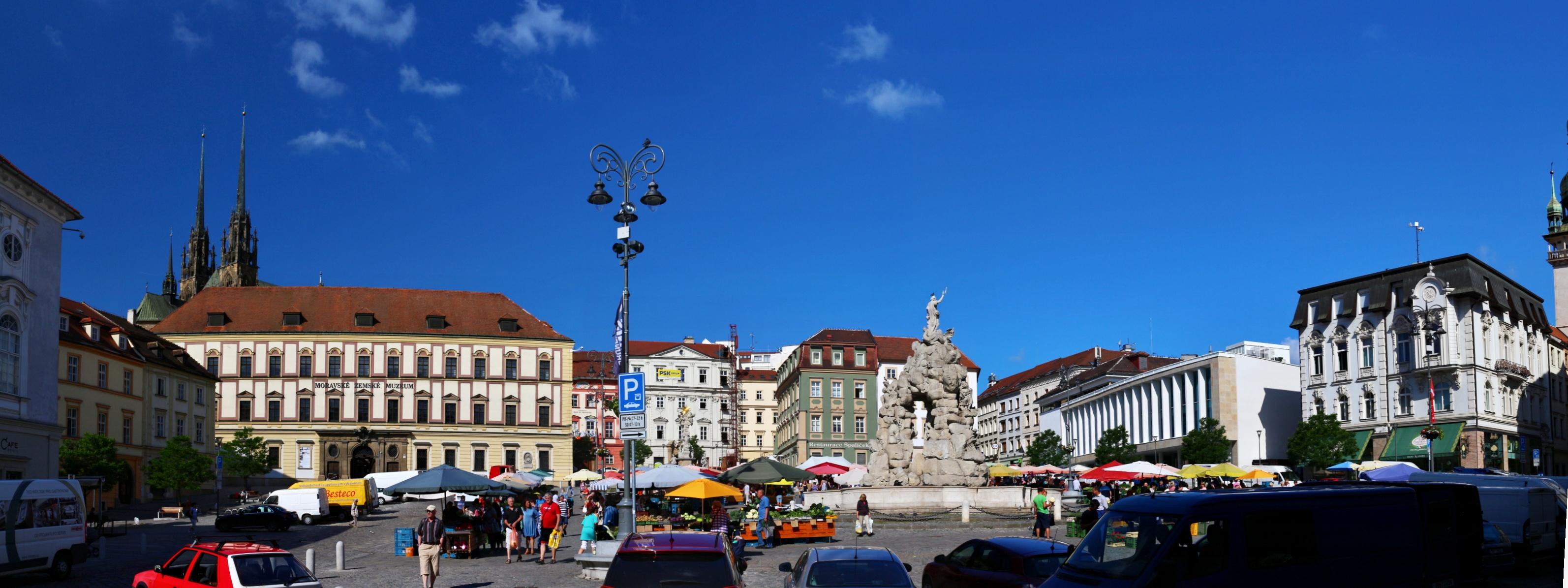 Zelný trh (Brno)